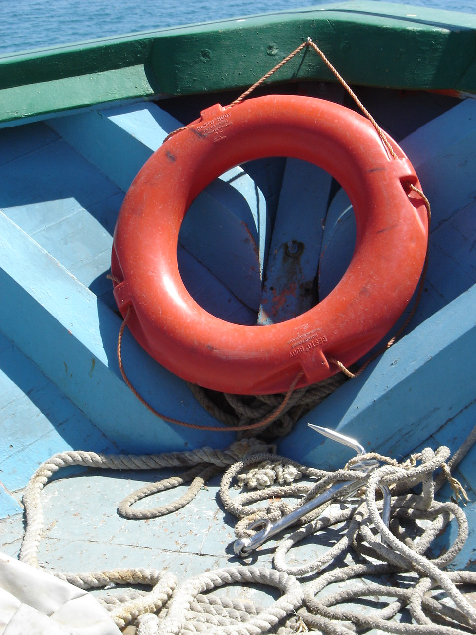 Boote und marine Anlagen, Zubehör und Details. Malta, April 2006. Rettungsring in einem Holzboot.